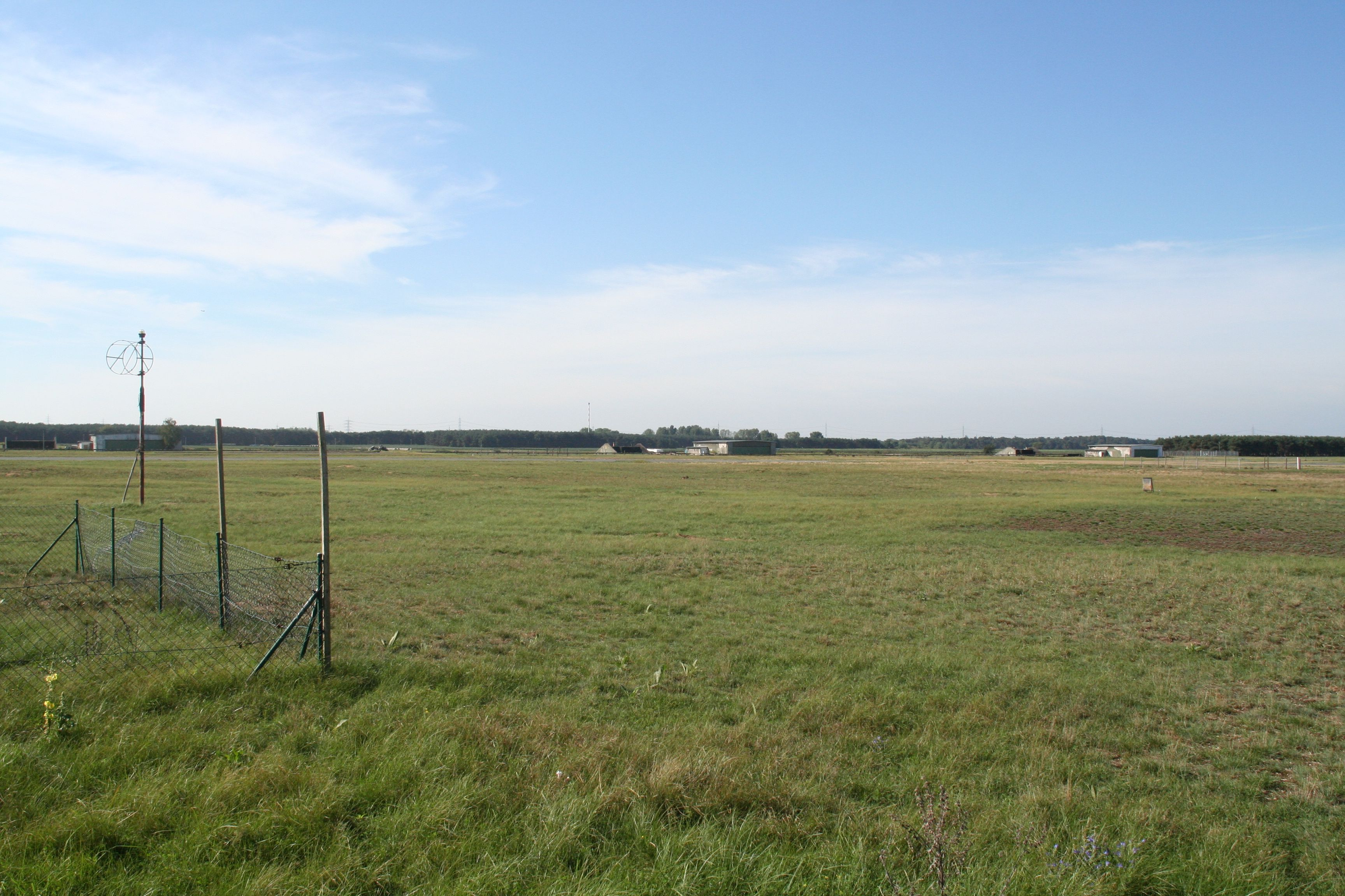 August-Euler-Flughafen, Flughafengelände, Blickrichtung Süden